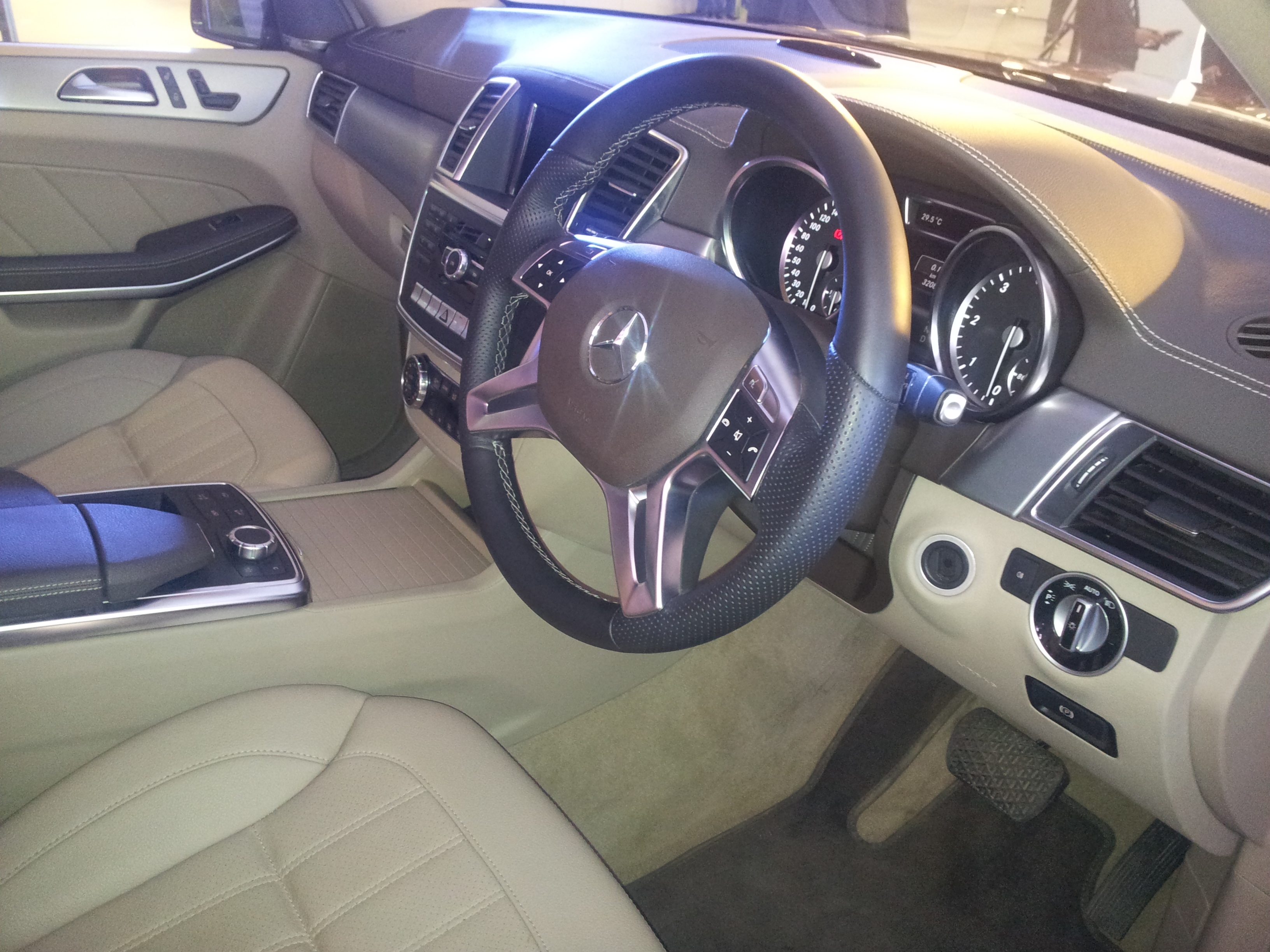 Mercedes Benz GL class Interior